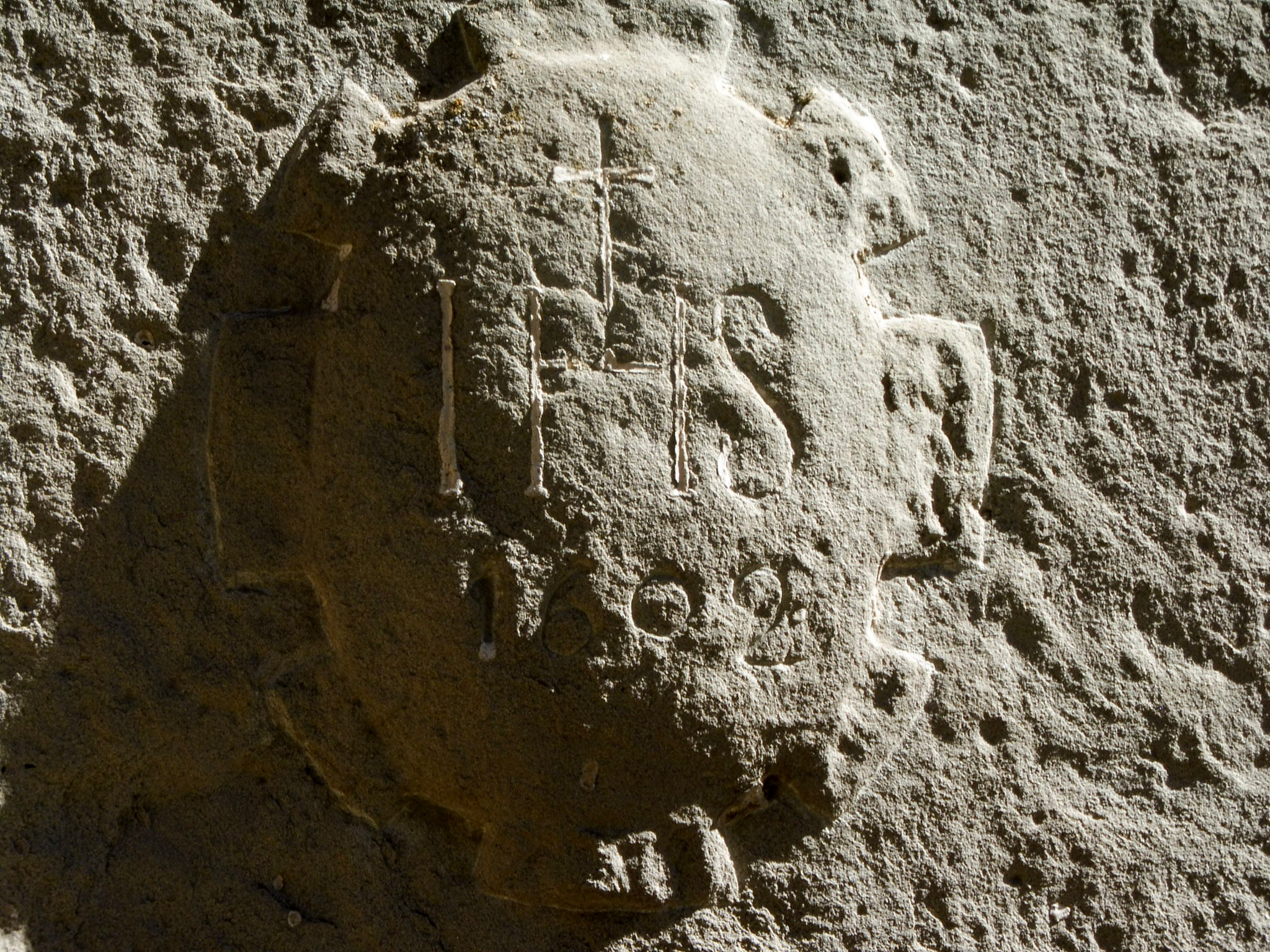 Capella de Sant Cosme i Sant Damià d'Amorós (Sant Guim de Freixenet): llinda de la porta